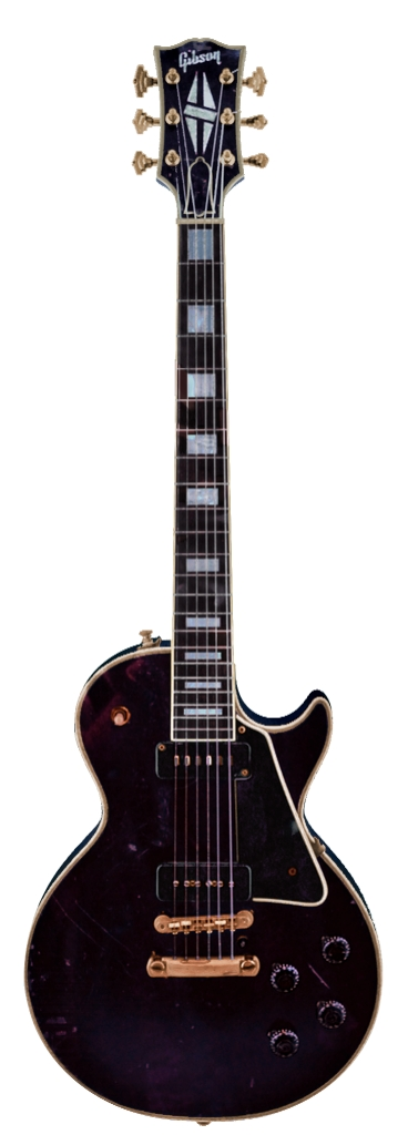 Gibson Les Paul Custom (1954-1957) Hendrix's guitar @ blues bar, Chicago